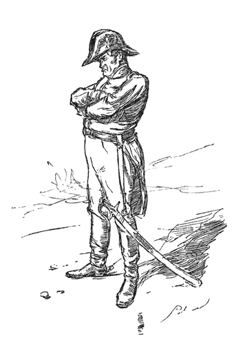 Carlos Garrote, personaje de "Un voluntario realista" de Galdós. Edición de la Imprenta y Litografía de La Guirnalda, 1878. Ilustración de Gómez Soler y Pellicer.